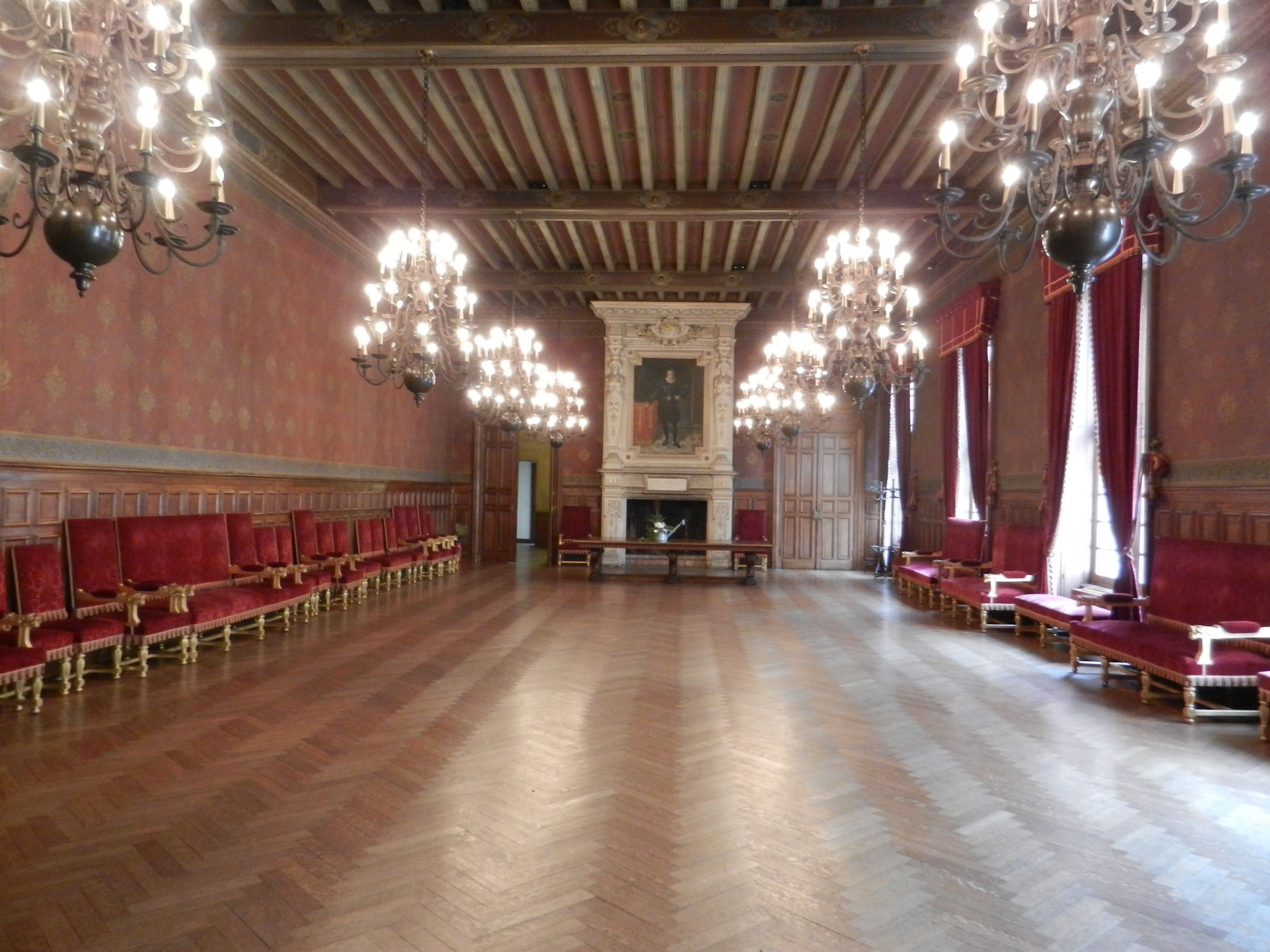 La salle des fêtes .